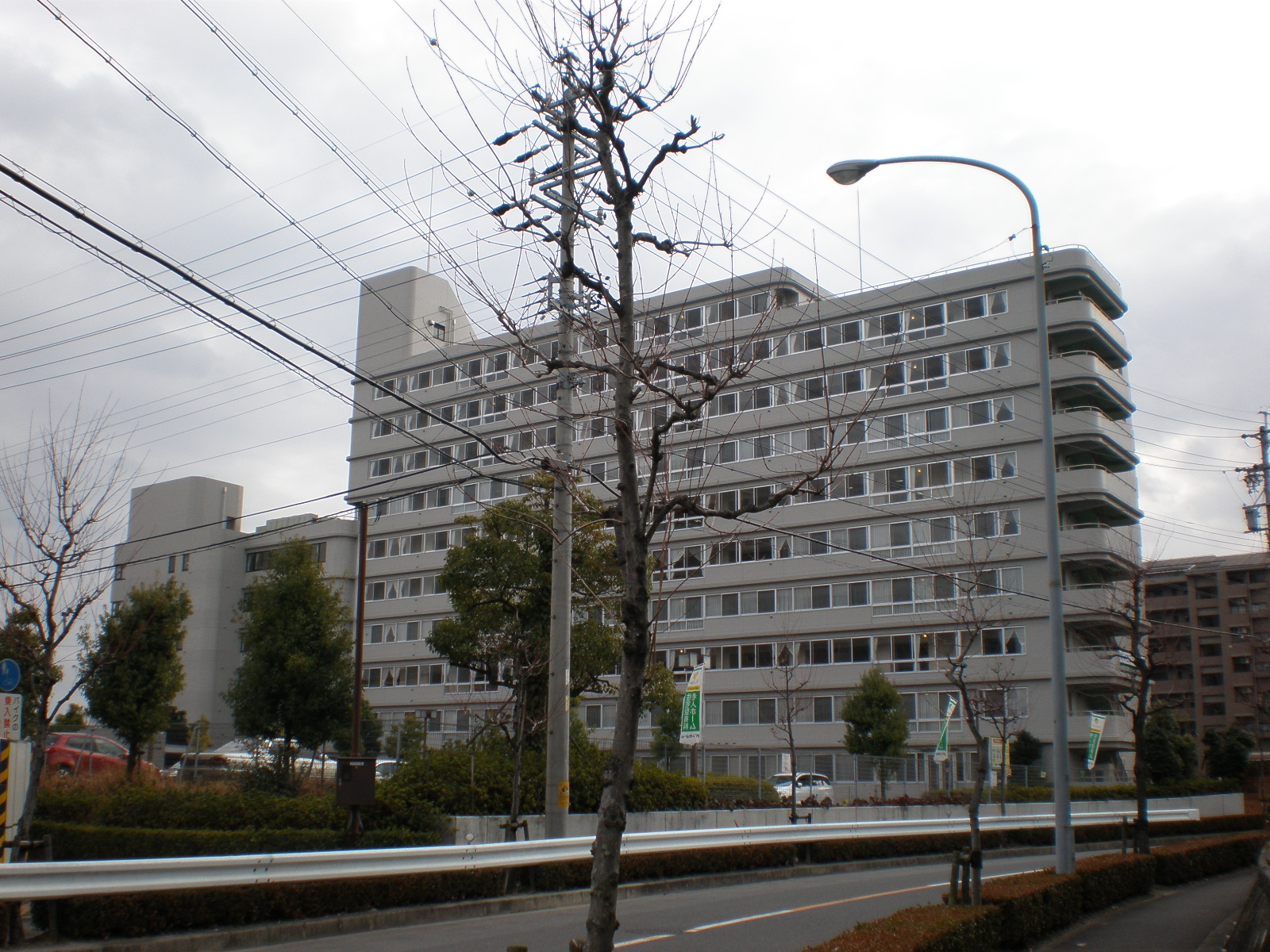 愛知県小牧市にある有料老人ホーム・ボンセジュール小牧